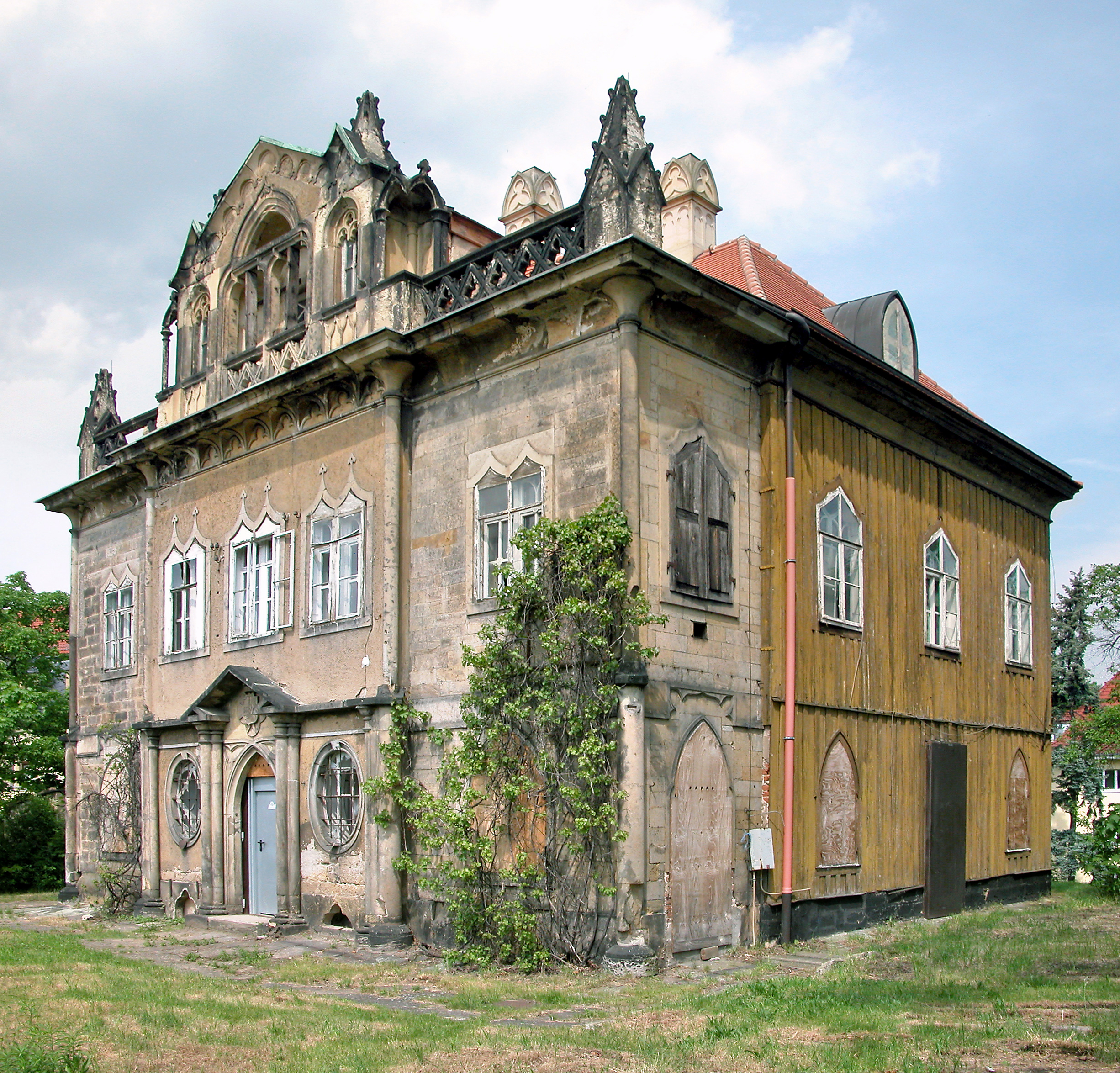 17.05.2008 01099 Dresden-Radeberger Vorstadt: Villa Marcolini, Radeberger Straße 60. Das sog. Waldschlösschen ließ Graf Camillo Marcolini (1739-1814) für seine irische Gemahlin Maria Anne O´Kelly 1785 - 1790 vom Baumeister Johann Daniel Schade als Jagdschloß errichten. Vorbild soll ein Schloß in Großbritannien gewesen sein. [DSCN32834-32835.TIF]20080517010MDR.JPG(c)Blobelt